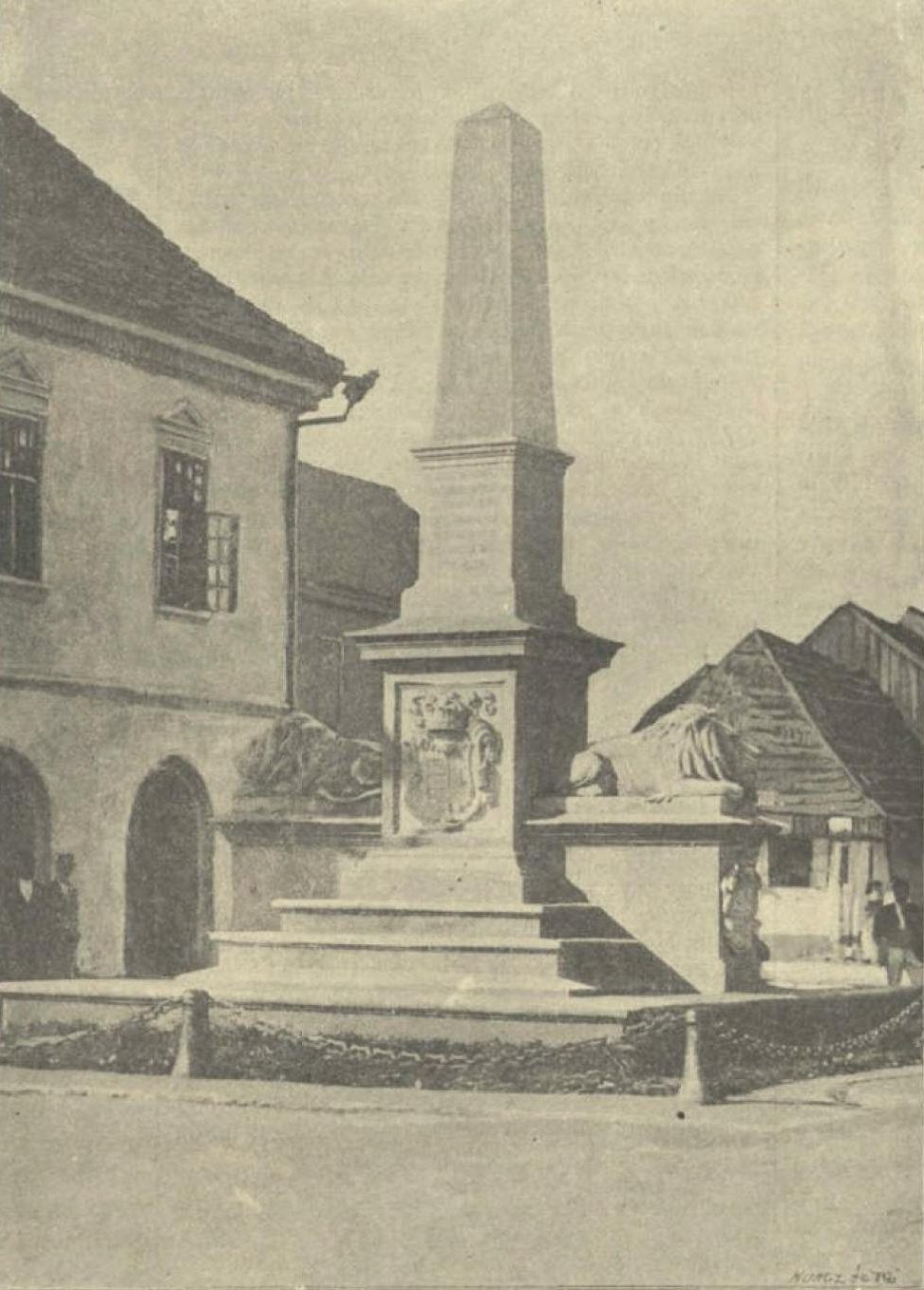 Ezredeévi emlékoszlop Székelyudvarhelyen